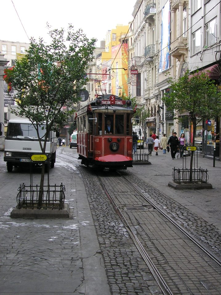 Istiklal street in Istanbul